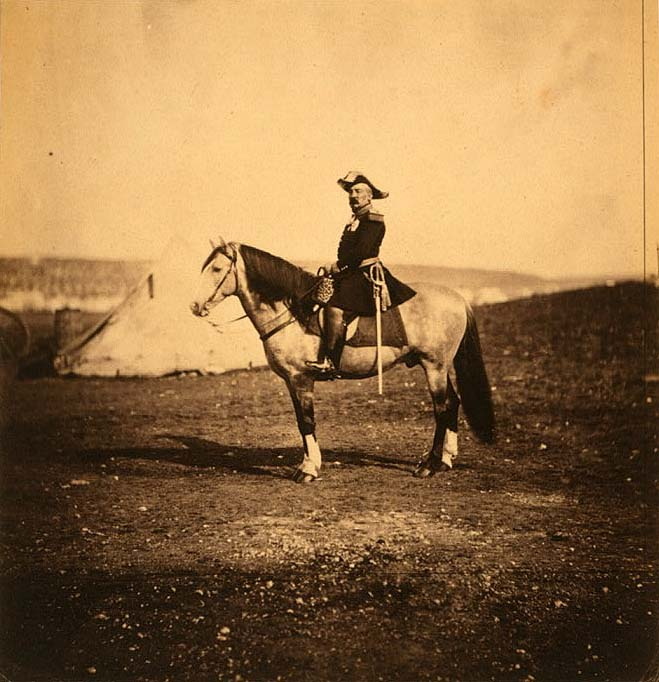 General Bosquet, Crimée